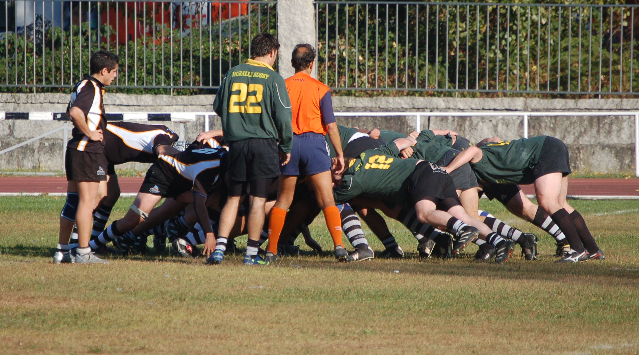 Melé nun encontro entre o Mareantes de Pontevedra e o Muralla de Lugo